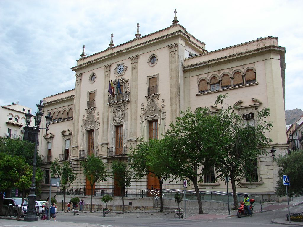 14. Juni 2010